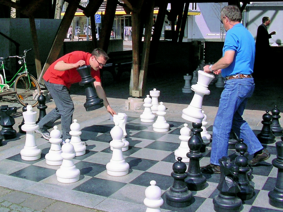 Gartenschach beim Kurhaus Bad Wörishofen, Schachfestival Bad Wörishofen 2011.